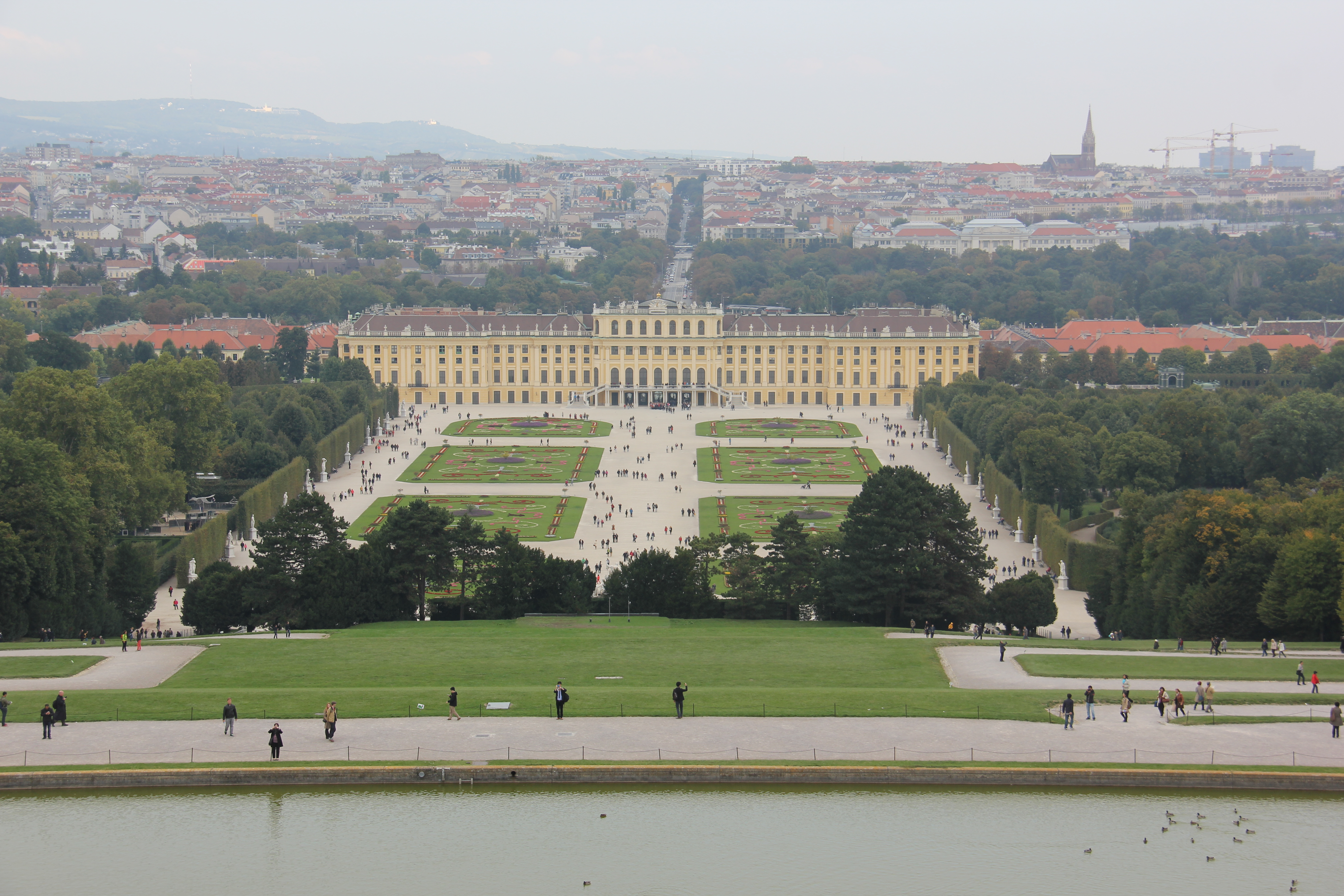 Schonbrunn Palace